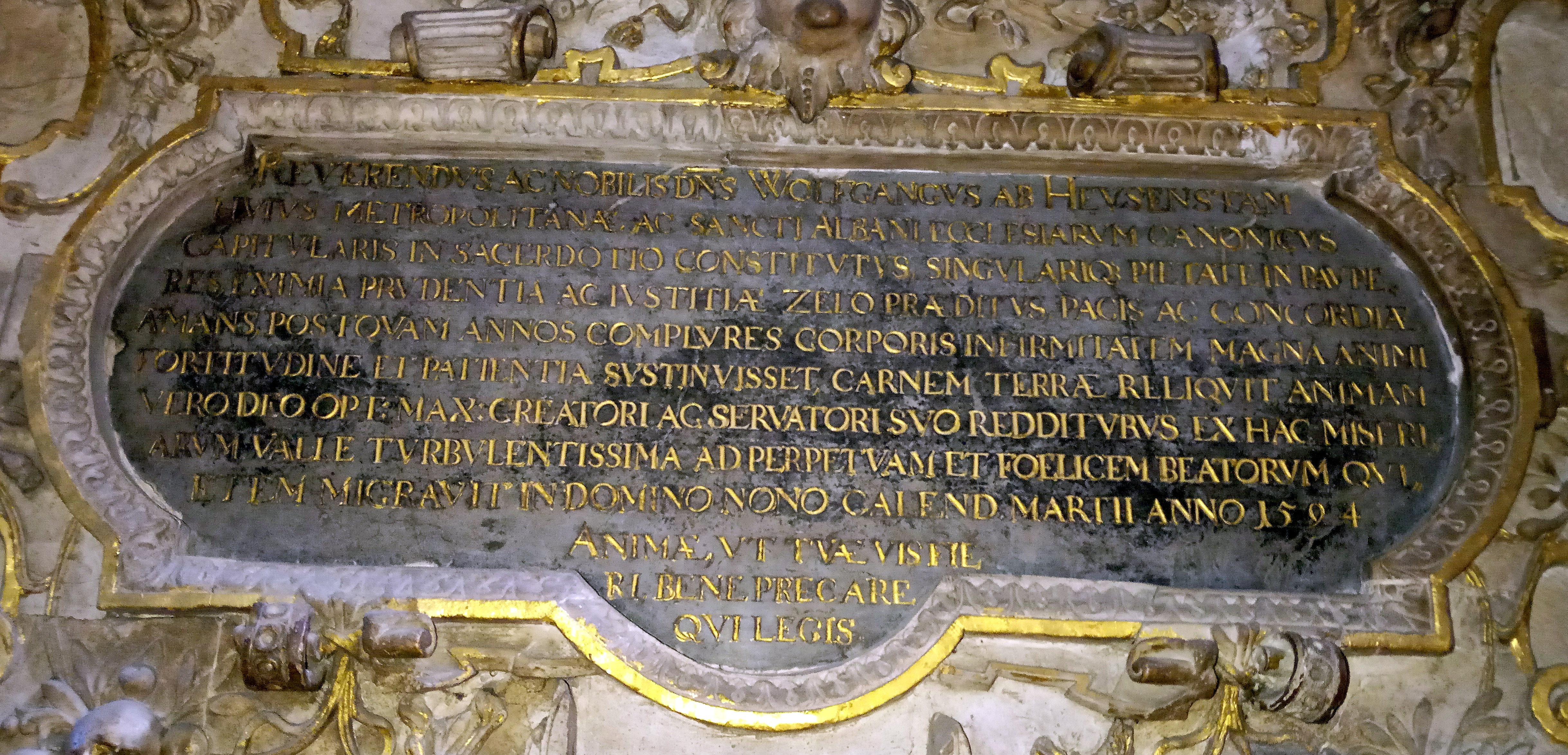 Mainzer Dom, Inschrift am Epitaph des Domkapitulars Wolfgang von Heusenstamm (+ 1594)